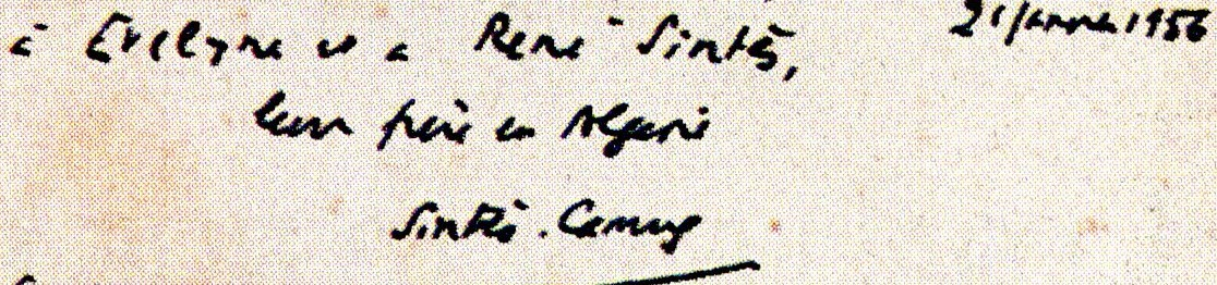 Signature de l'écrivain français Albert Camus